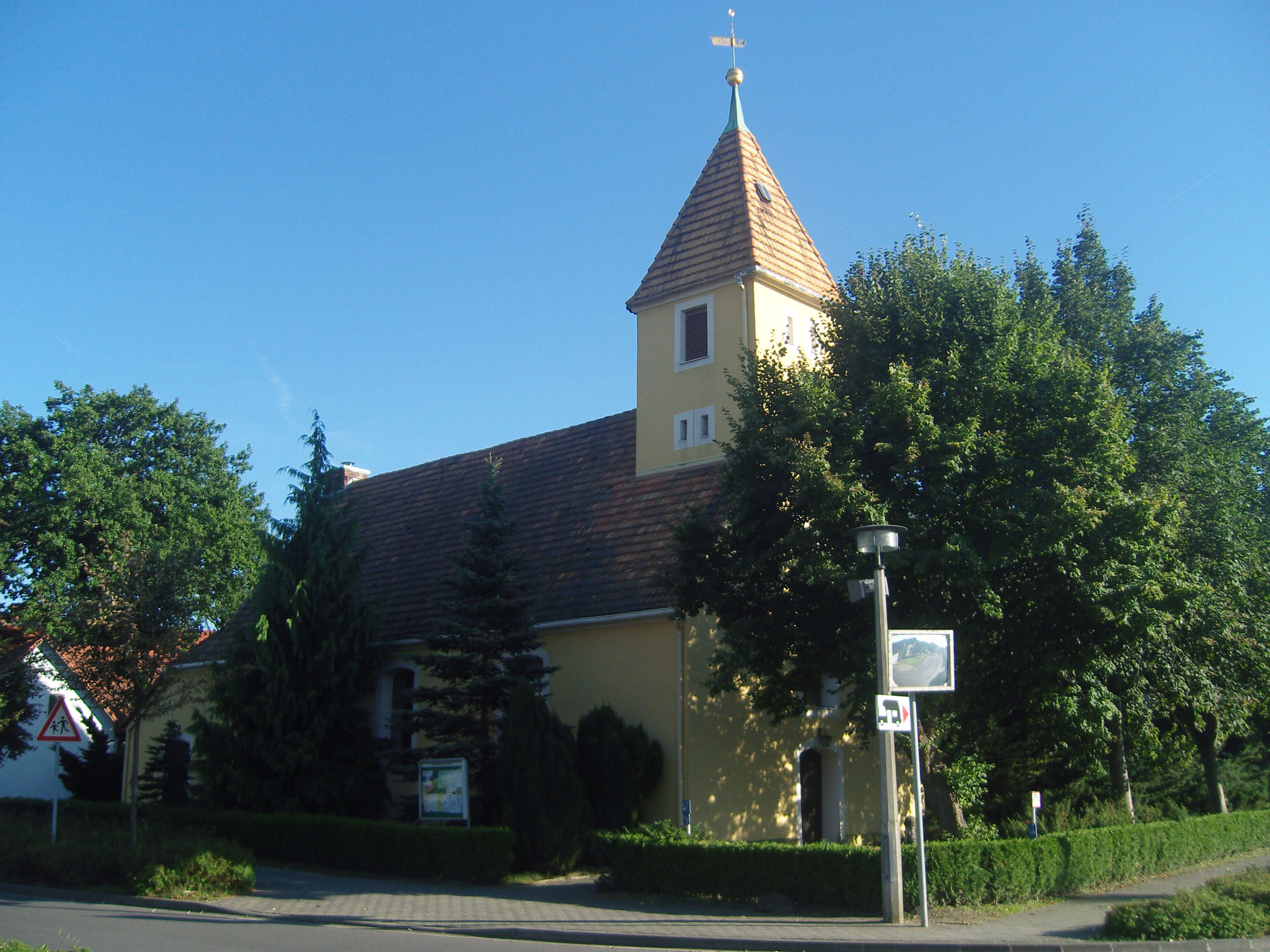 Kirche in Tätzschwitz, Gemeinde Elsterheide Hornjoserbsce: Ptačanska ewangelska cyrkej, gmejna Halštrowska hola